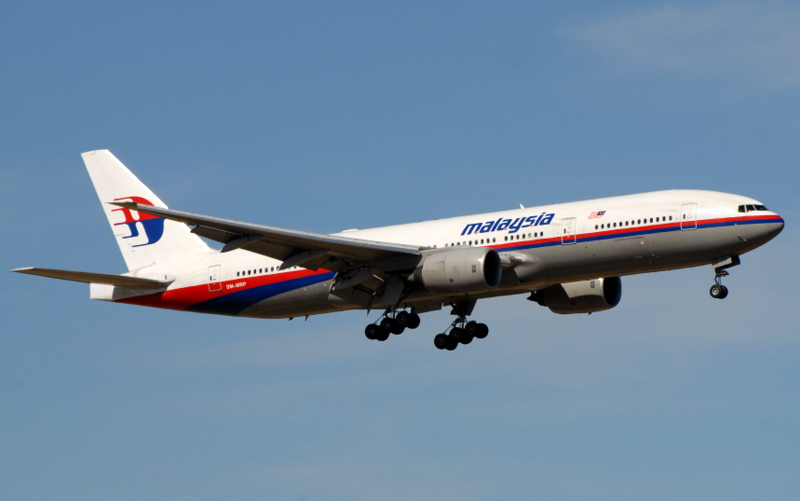 Malaysian 777